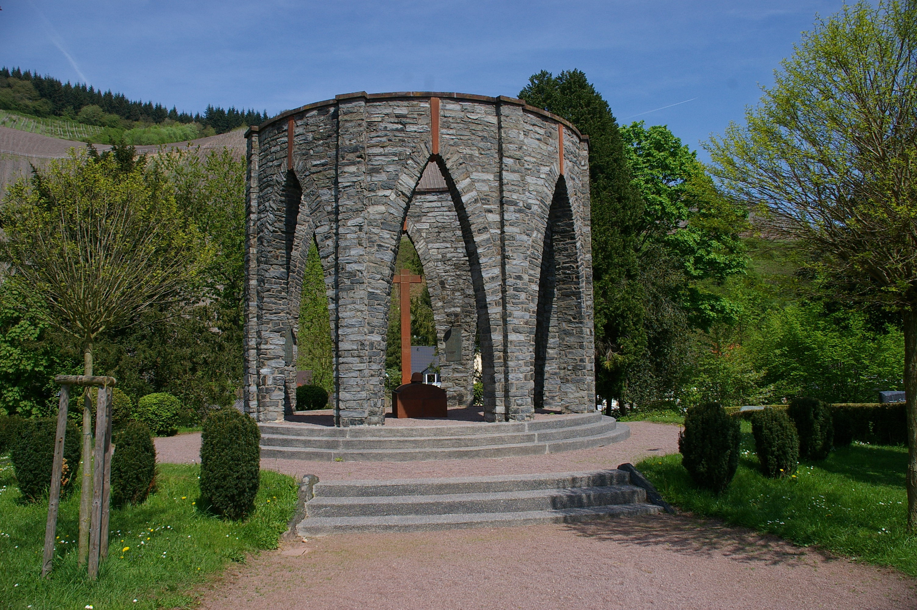 Kriegerdenkmal in Saarburg-Niederleuken